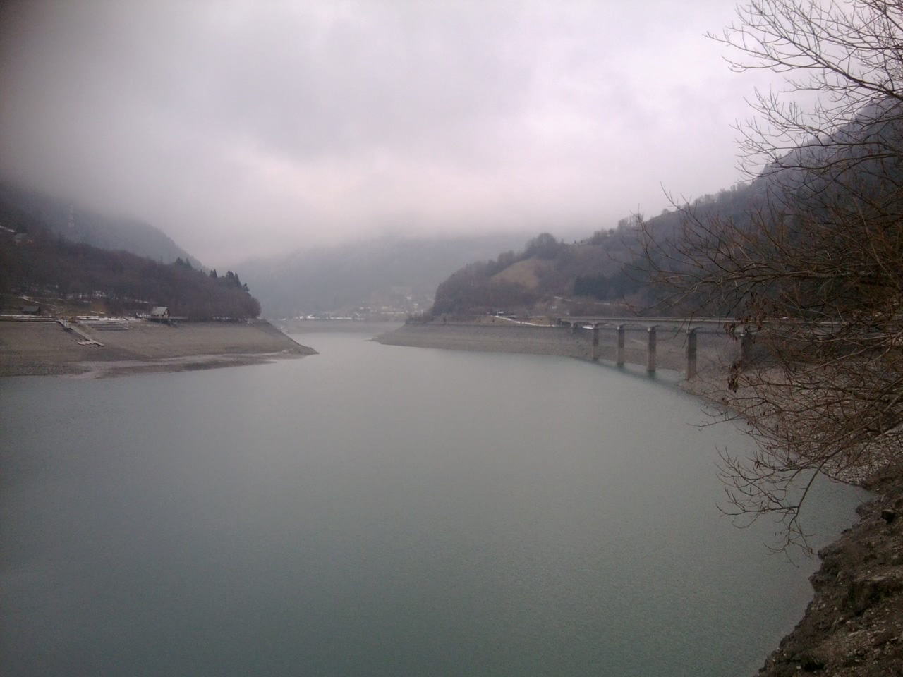 Lac du Verney (38) : Vue depuis le barrage.